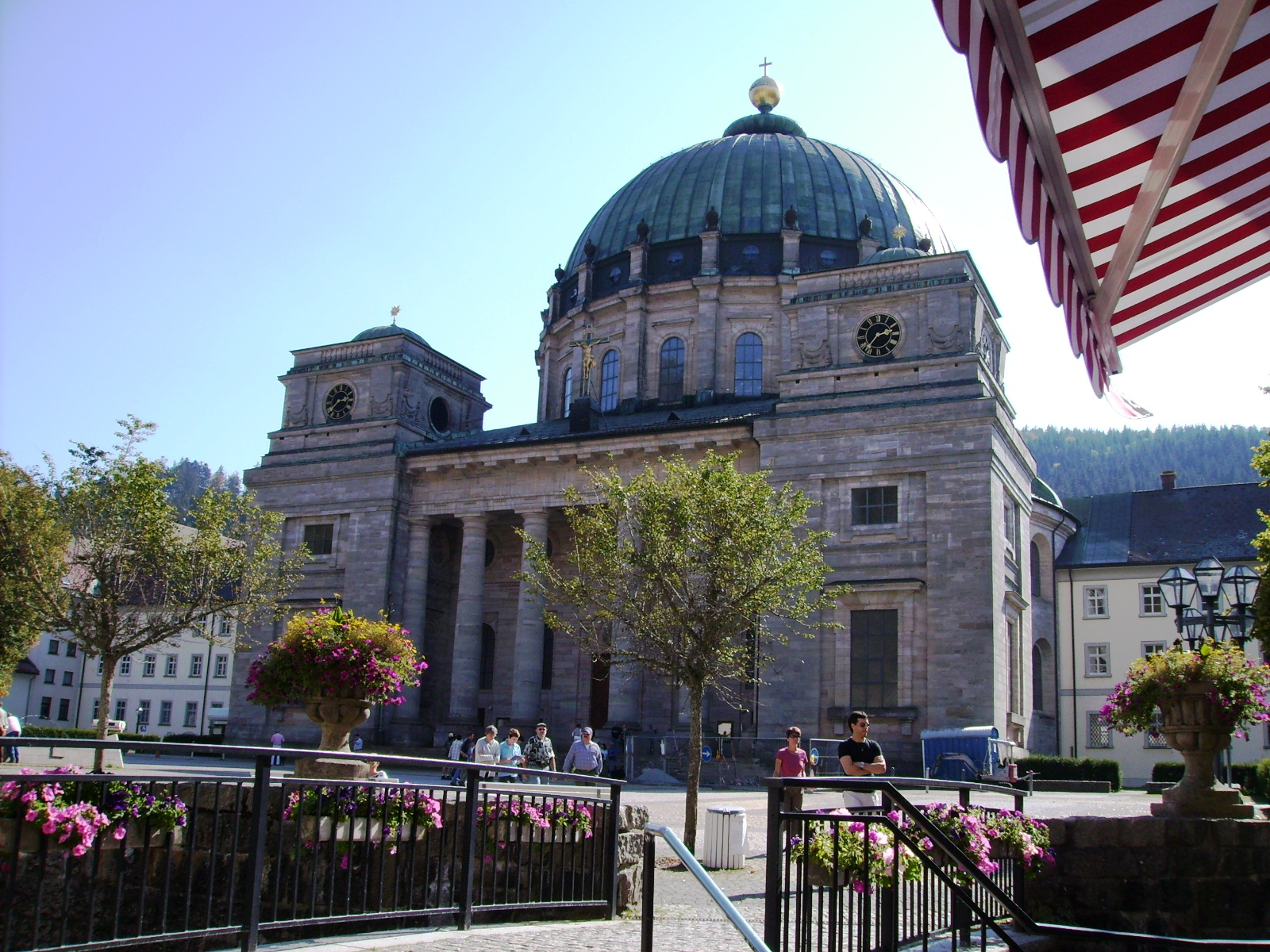 Sankt Blasien Schwarzwald